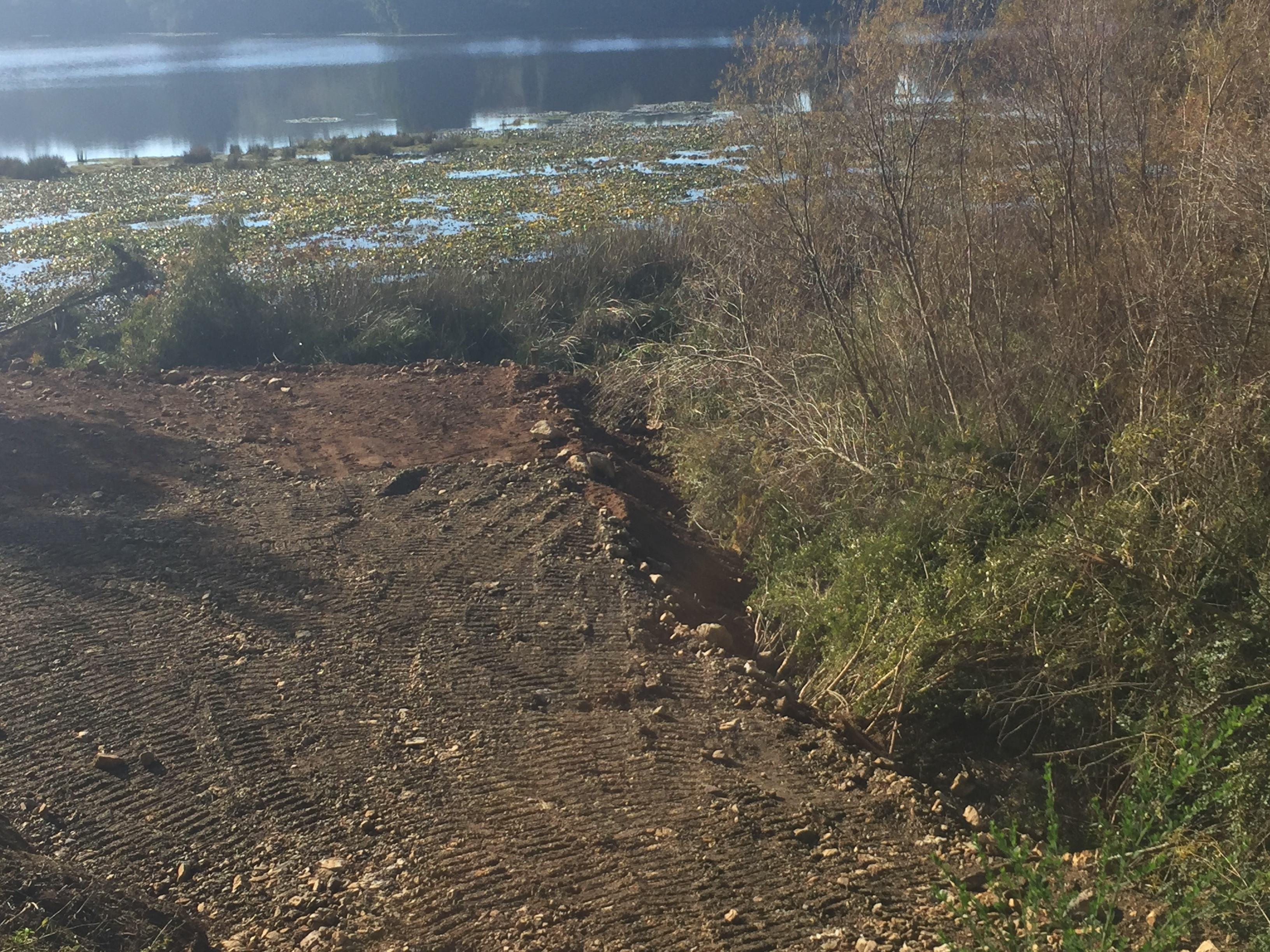 La laguna Pineda es considerado un santuario de la naturaleza, y con esta calidad es respetado por la comunidad Penquista. El año 2016 se comenzó una intervención que pone en riesgo la vida de miles de especies, entre las intervenciones mas complejas están el relleno de los humedales de la laguna por parte de privados con fines inmobiliarios. El bosque nativo también vio afectado por la acción de privados aun que fue detenida su tala por la denuncia presentada por la Coordinadora Regional del Medio Ambiente quien logro detener momentáneamente esta intervención al Santuario de la Naturaleza de la Región Del Bio Bio.